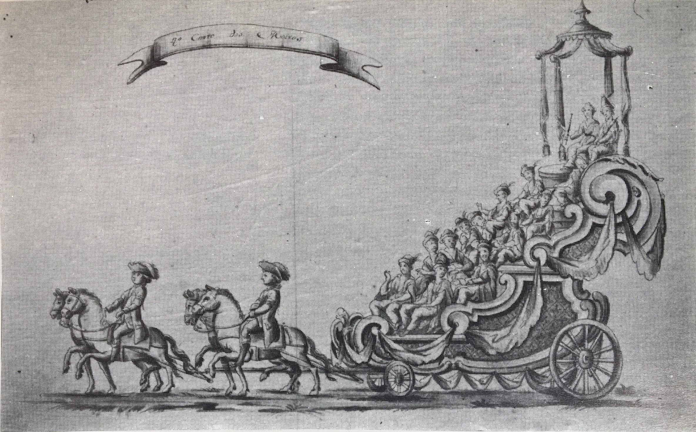 Desenho do carro alegórico "dos Mouros" de Antônio Francisco Soares de 1786 para as festividades locais comemorativas do casamento dos Infantes de Portugal.